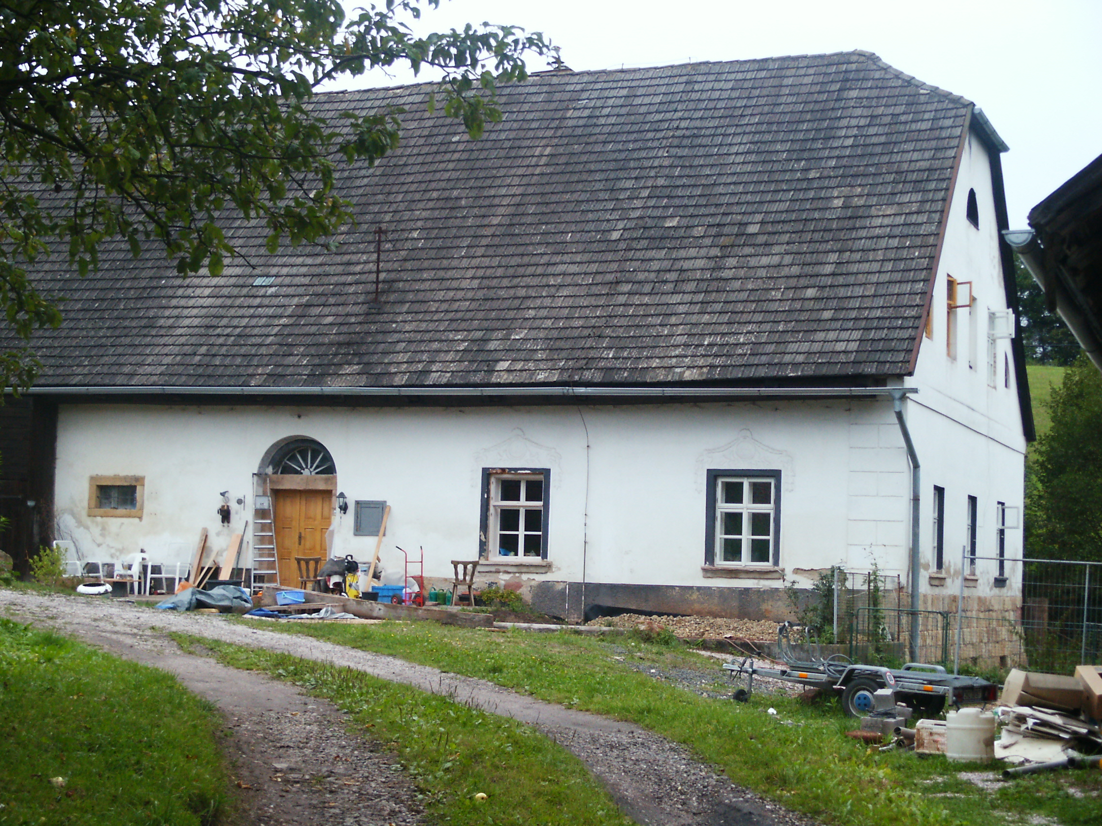 Venkovský dům, Horní Olešnice 3